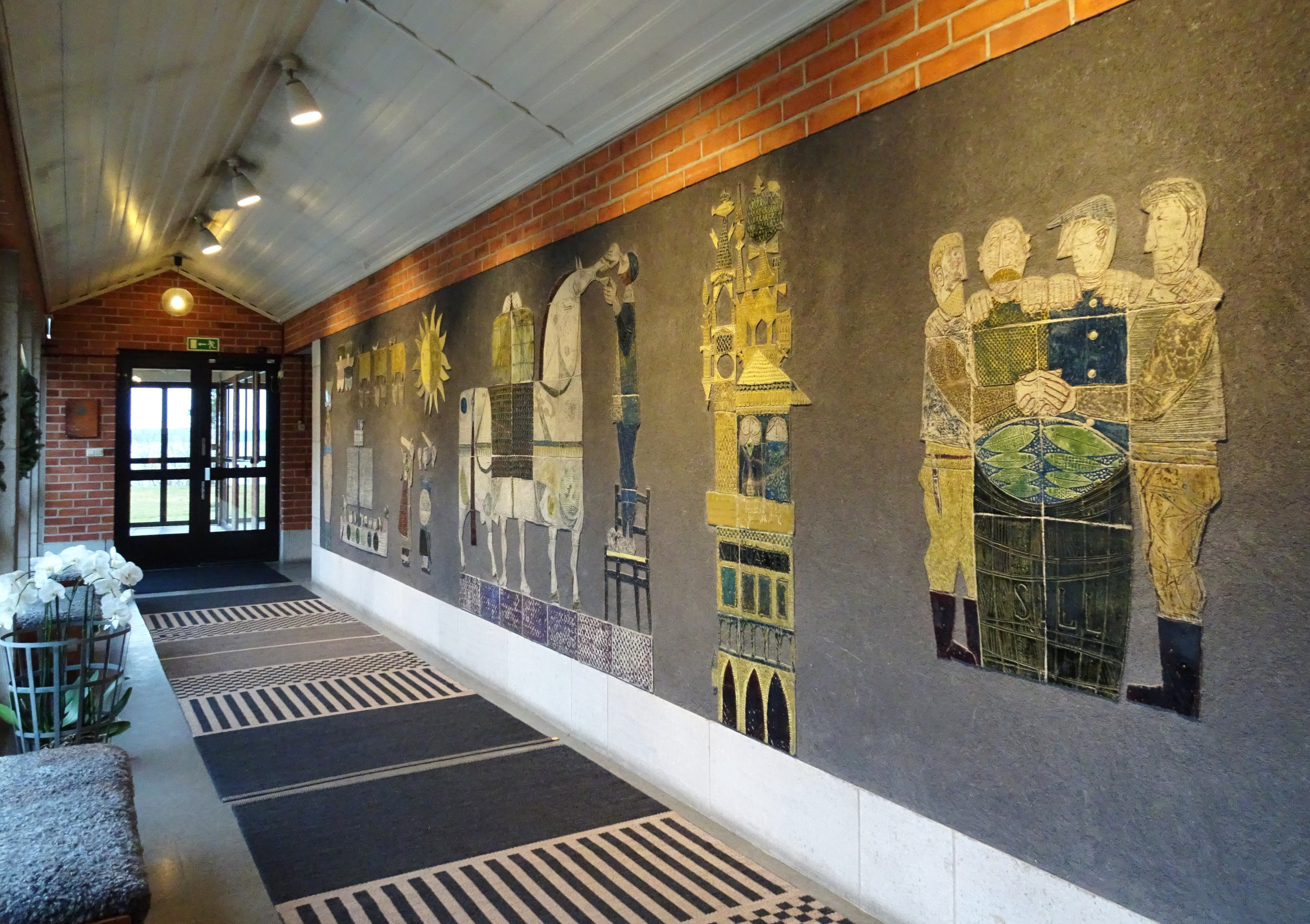 Vår Gård konferensanläggning, Stig Lindbergs väggutsmyckning